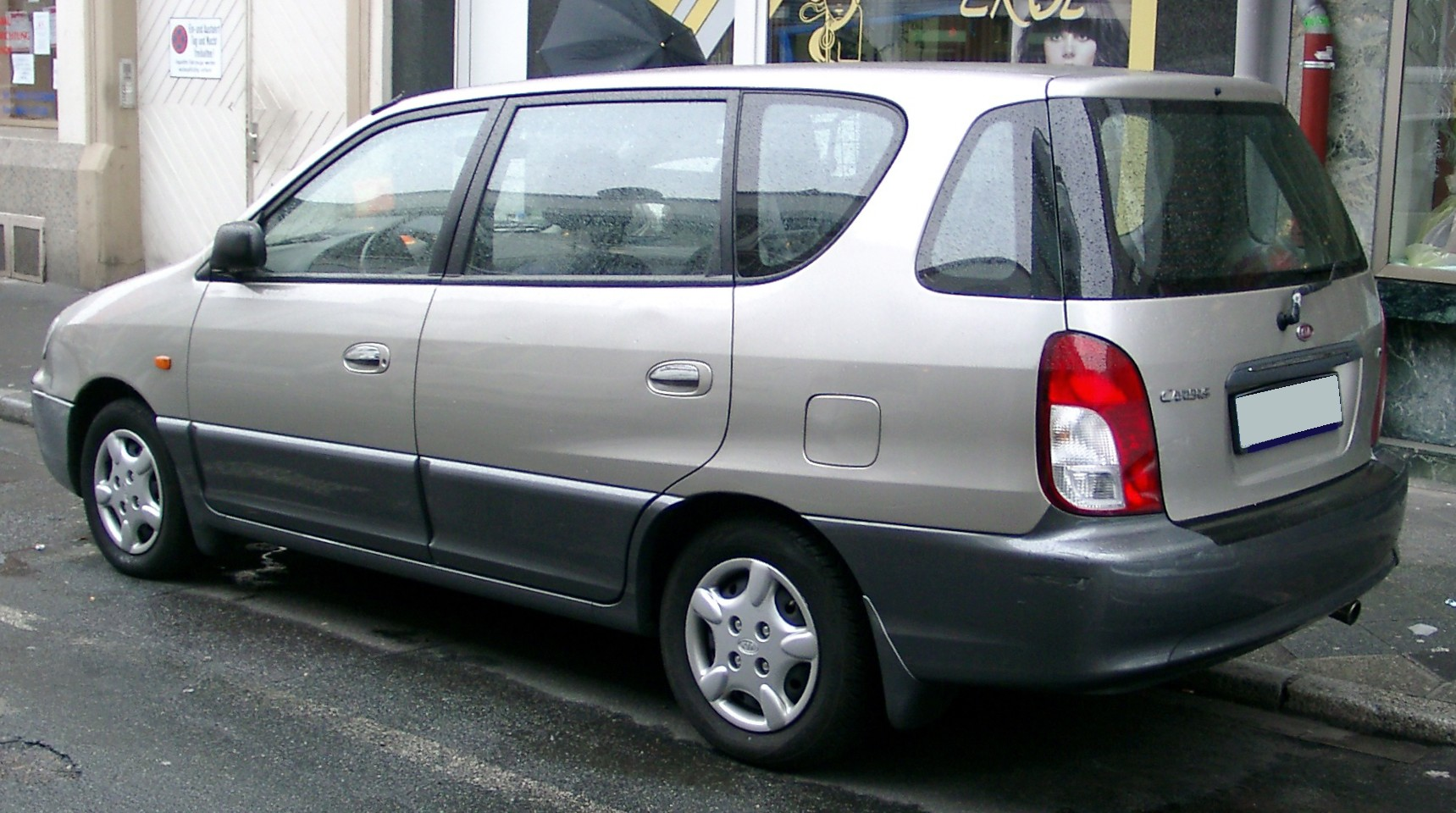 Kia Carens